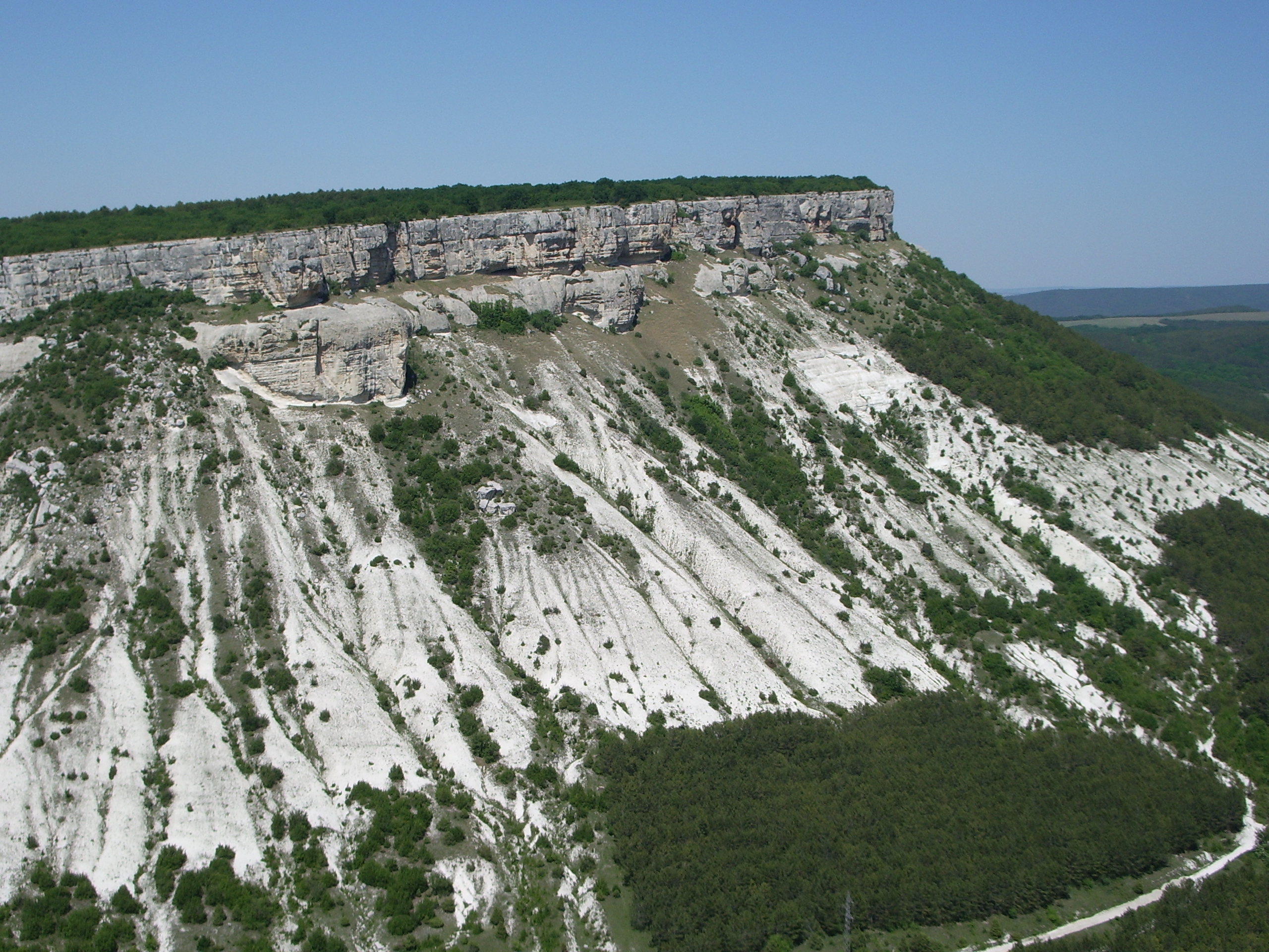 Куэсты горы Беш-Кош. Чуфут-Кале. Бахчисарай. Крым. Июнь 2009